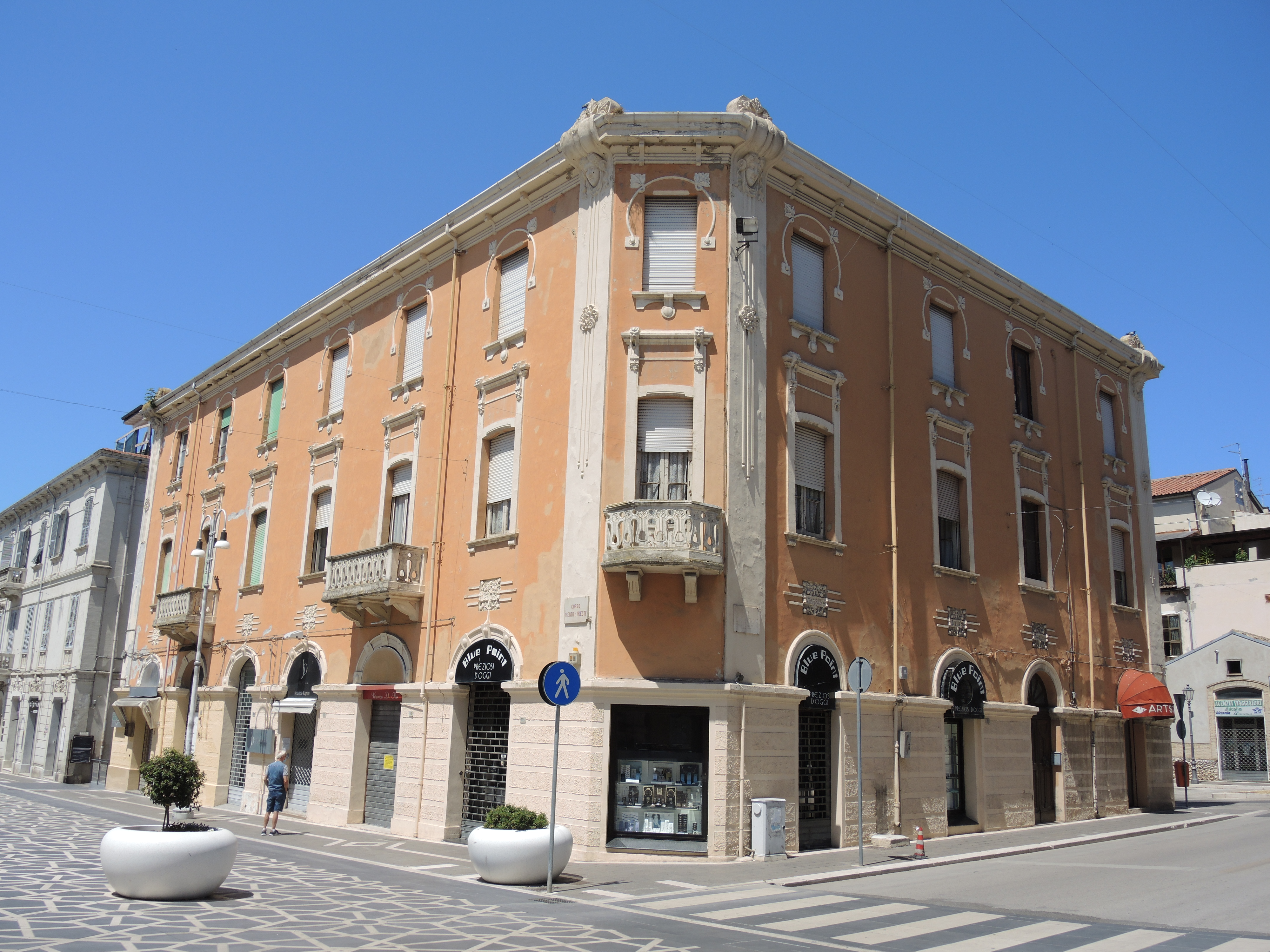 Lanciano